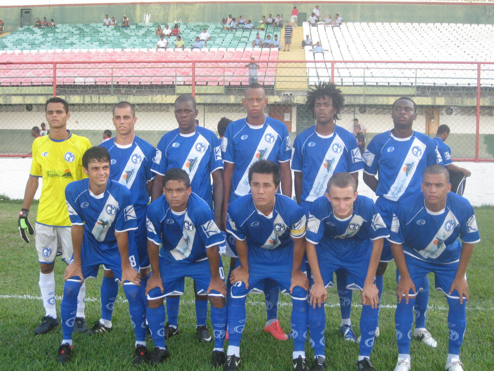 Equipe profissional do Grêmio Mangaratibense em 2010, que disputa o Campeonato Estadual da Série C do Rio de Janeiro. Foto feita no estádio Luso-Brasileiro, na Ilha do Governador em jogo contra o Kaiserburg Futebol Clube, com vitória deste por 2 a 1.